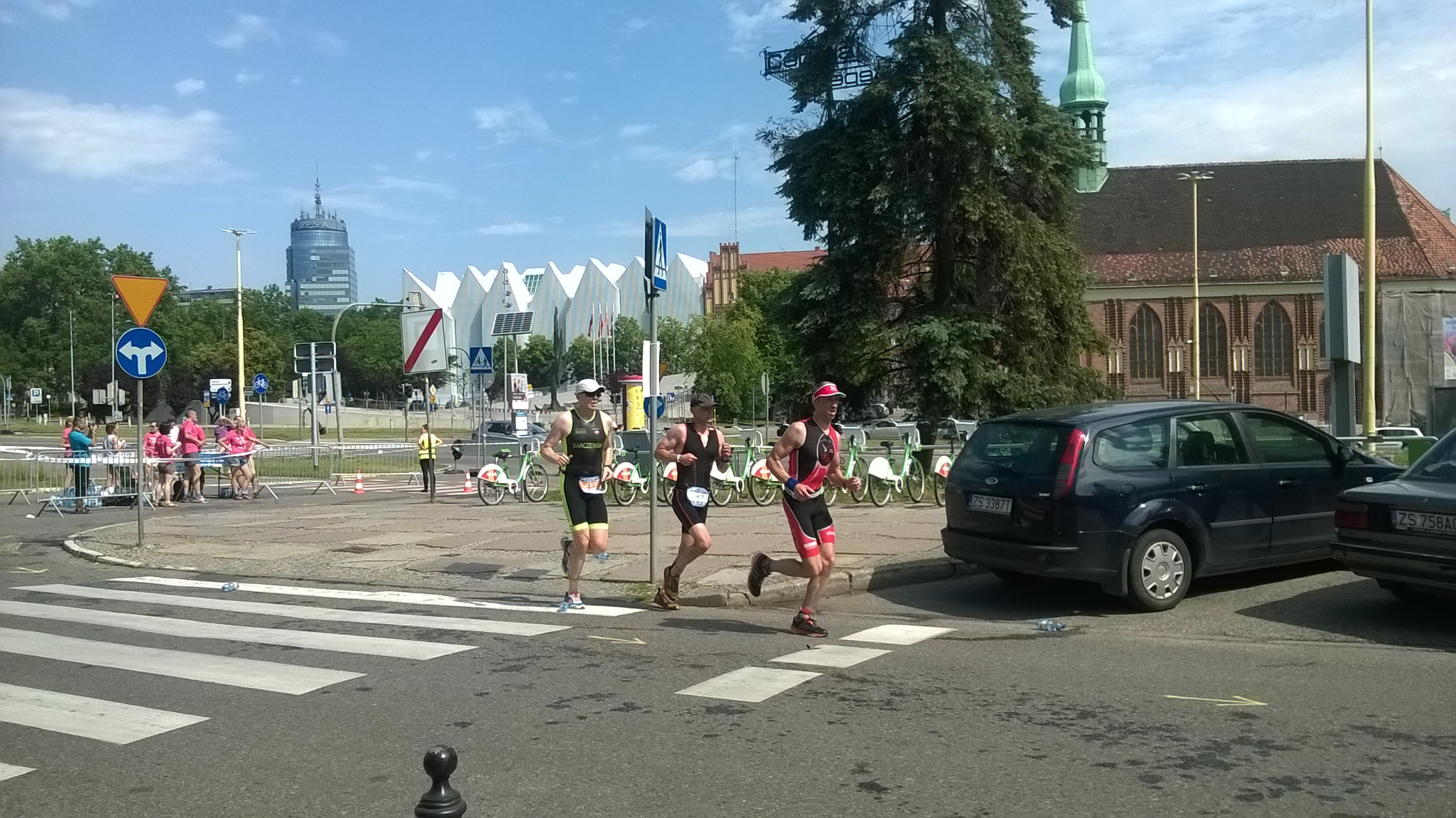 Triathlon w Szczecinie 5 lipca 2015 - trasa biegu (2)